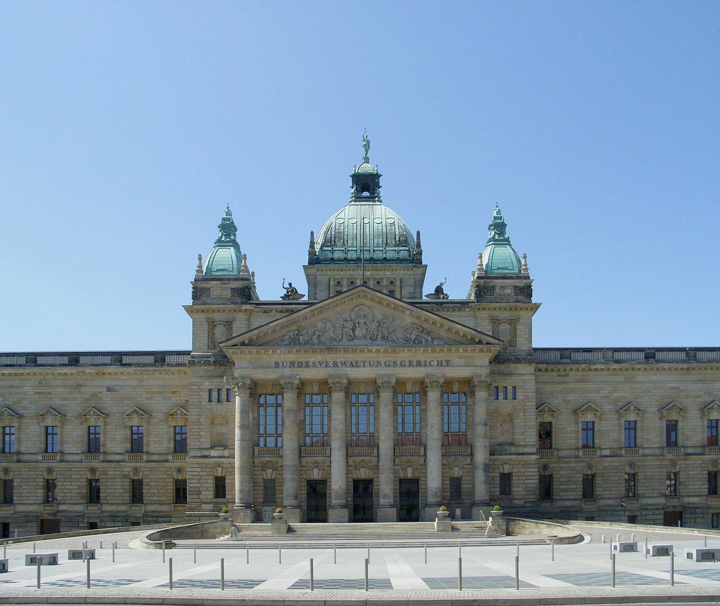 Dieses Bild zeigt das Bundesverwaltungsgericht in Leipzig.